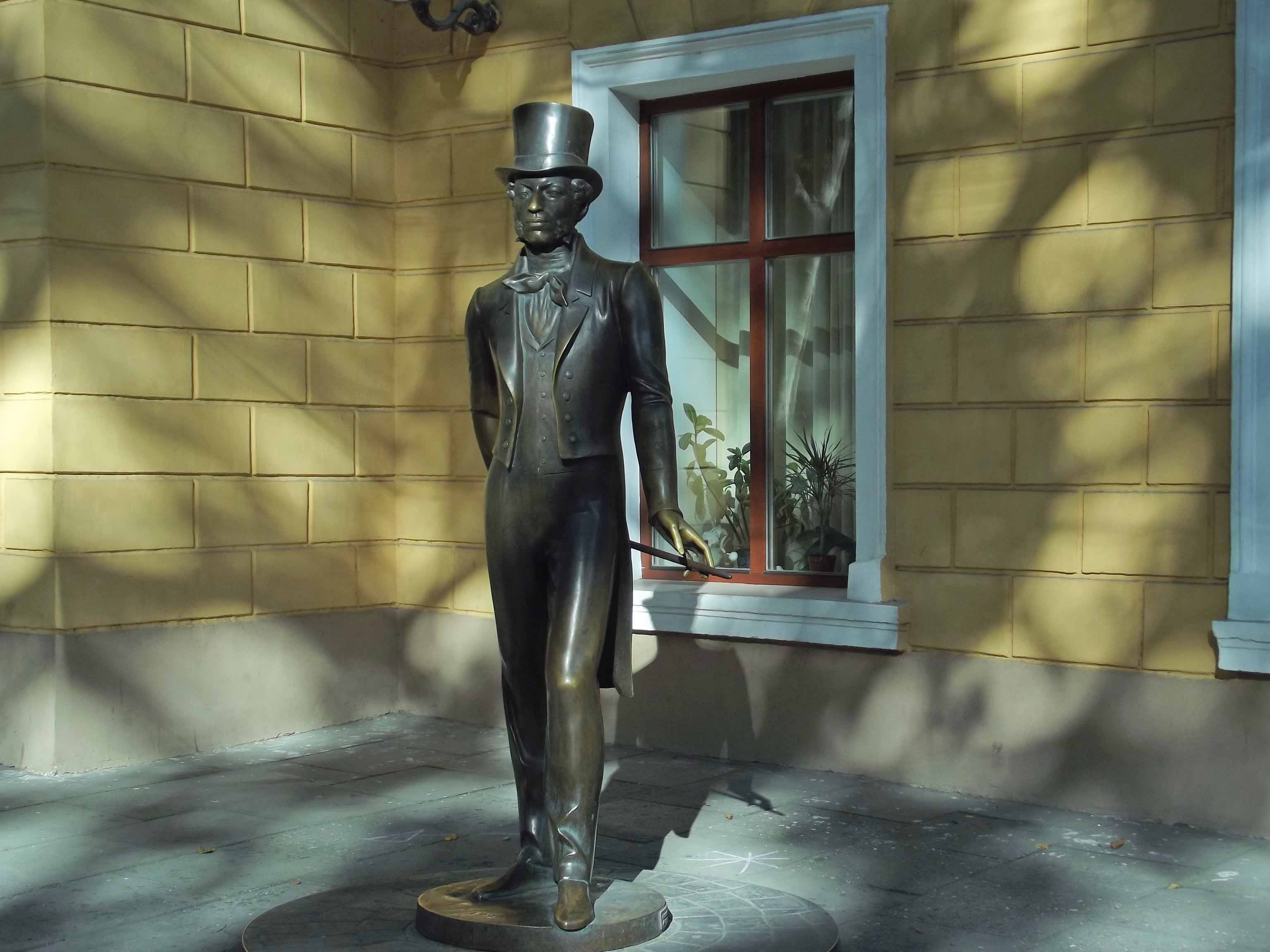 Памятник Пушкину у музея Пушкина